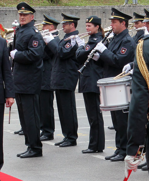 Predsednik vlade ob dnevu državnosti prek videokonference nagovoril pripadnike slovenskih kontingentov na misijah v tujini.